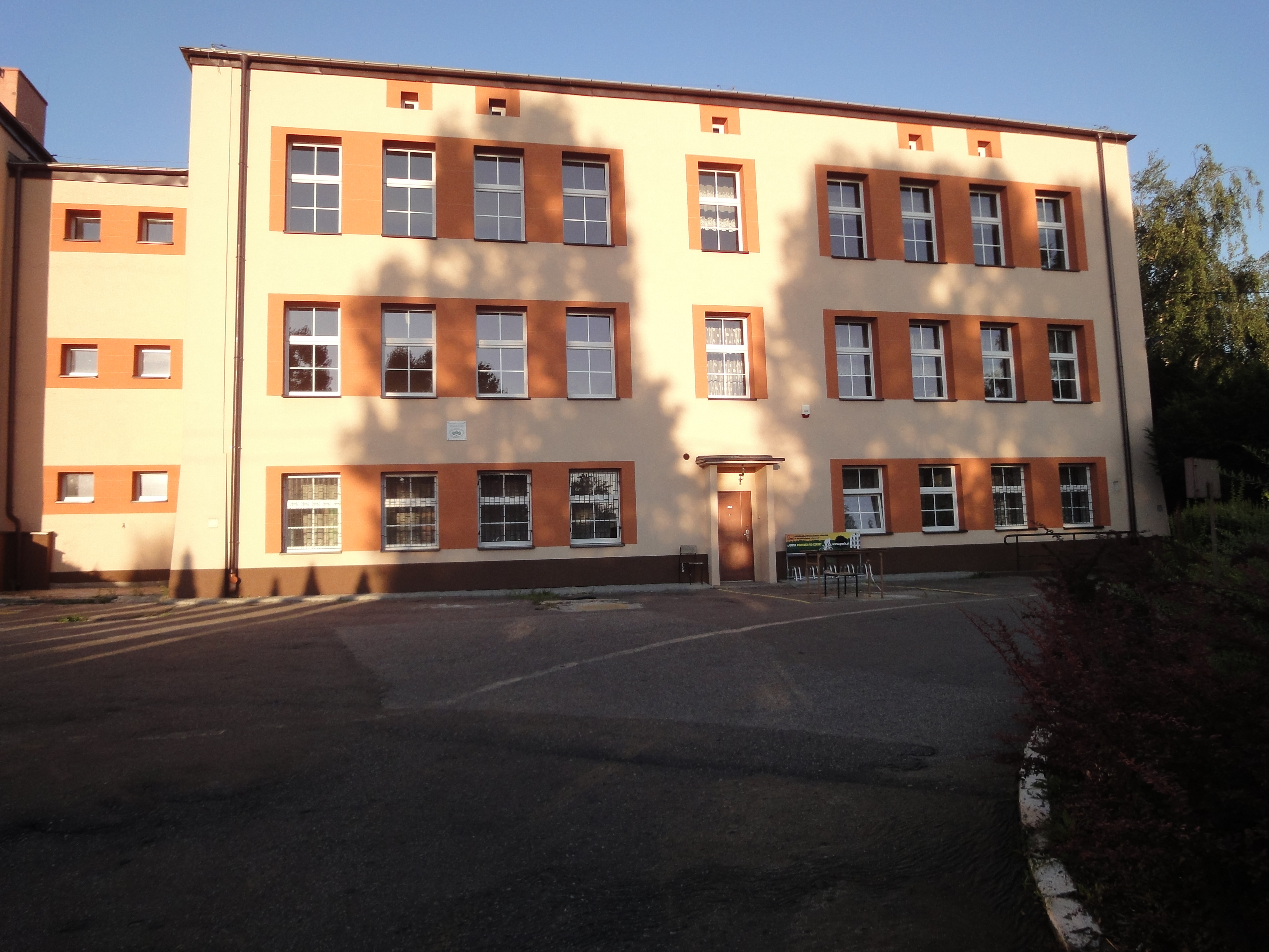 Szkoła podstawowa nr 3 w Wojkowicach